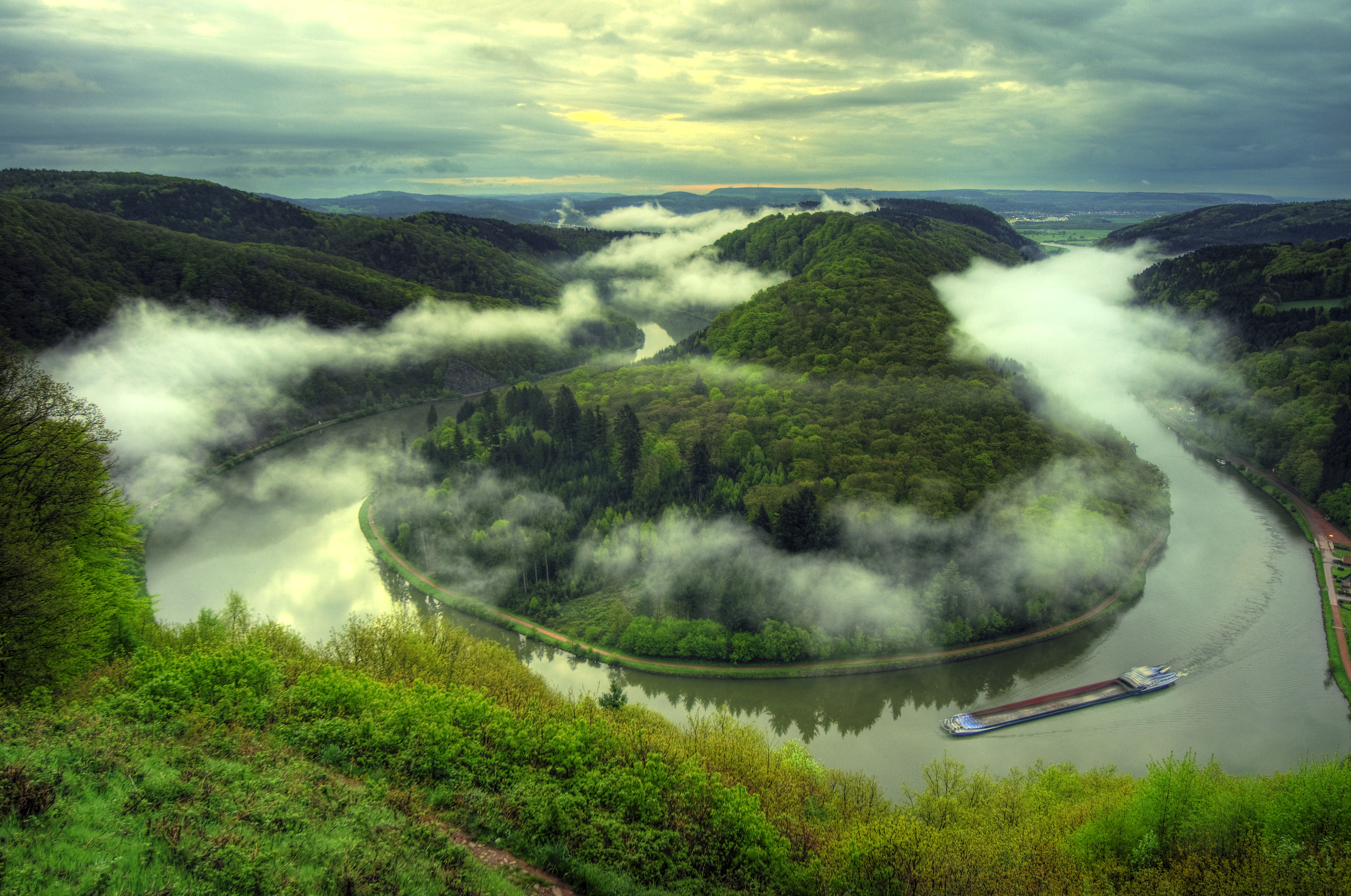 Saarschleife Kiswahili: Mto Saar. From Wikipedia, the free encyclopedia